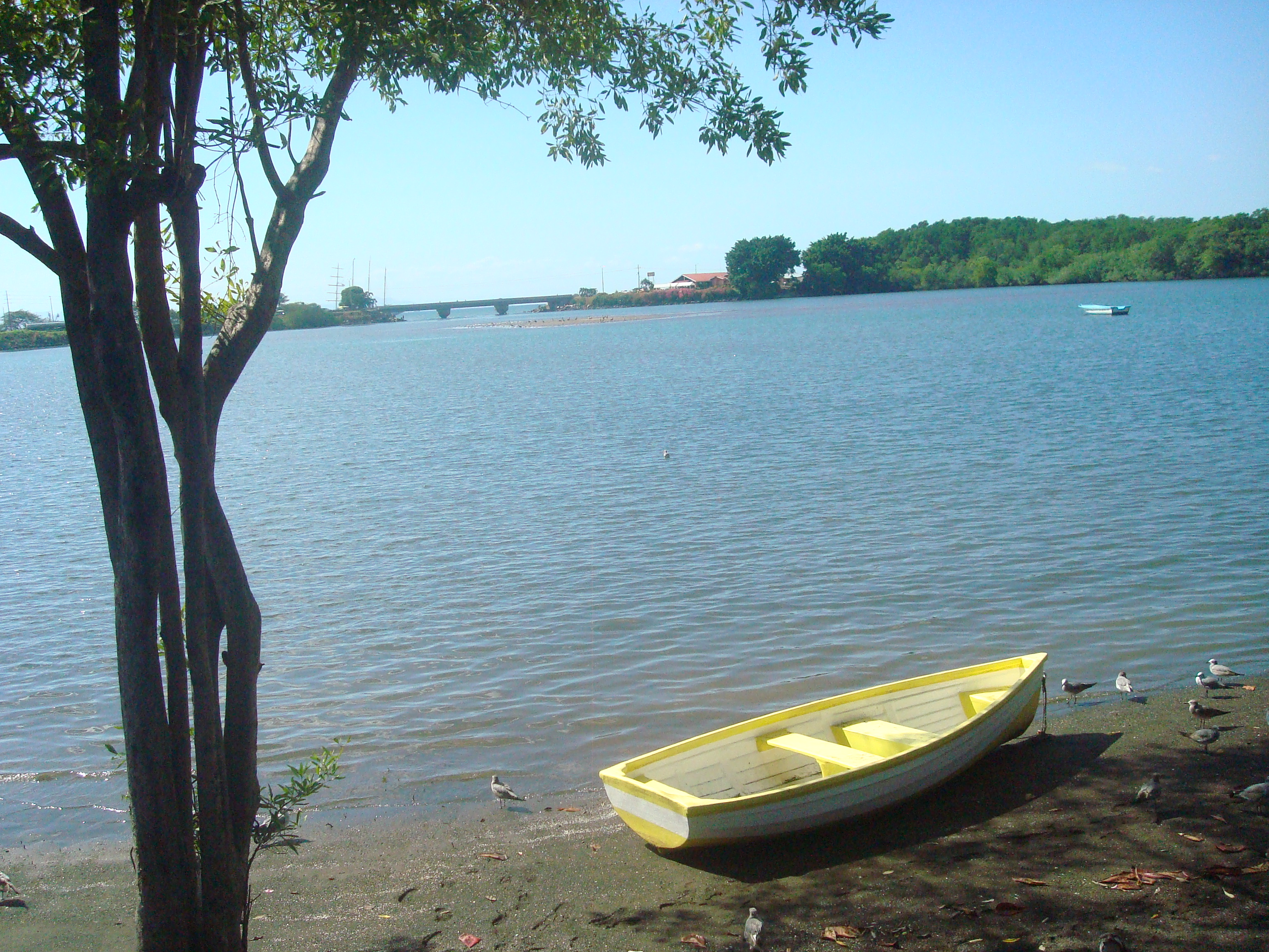 El estero de Mata de Limón, Puerto Caldera, en la provincia de Puntarenas, Costa Rica.